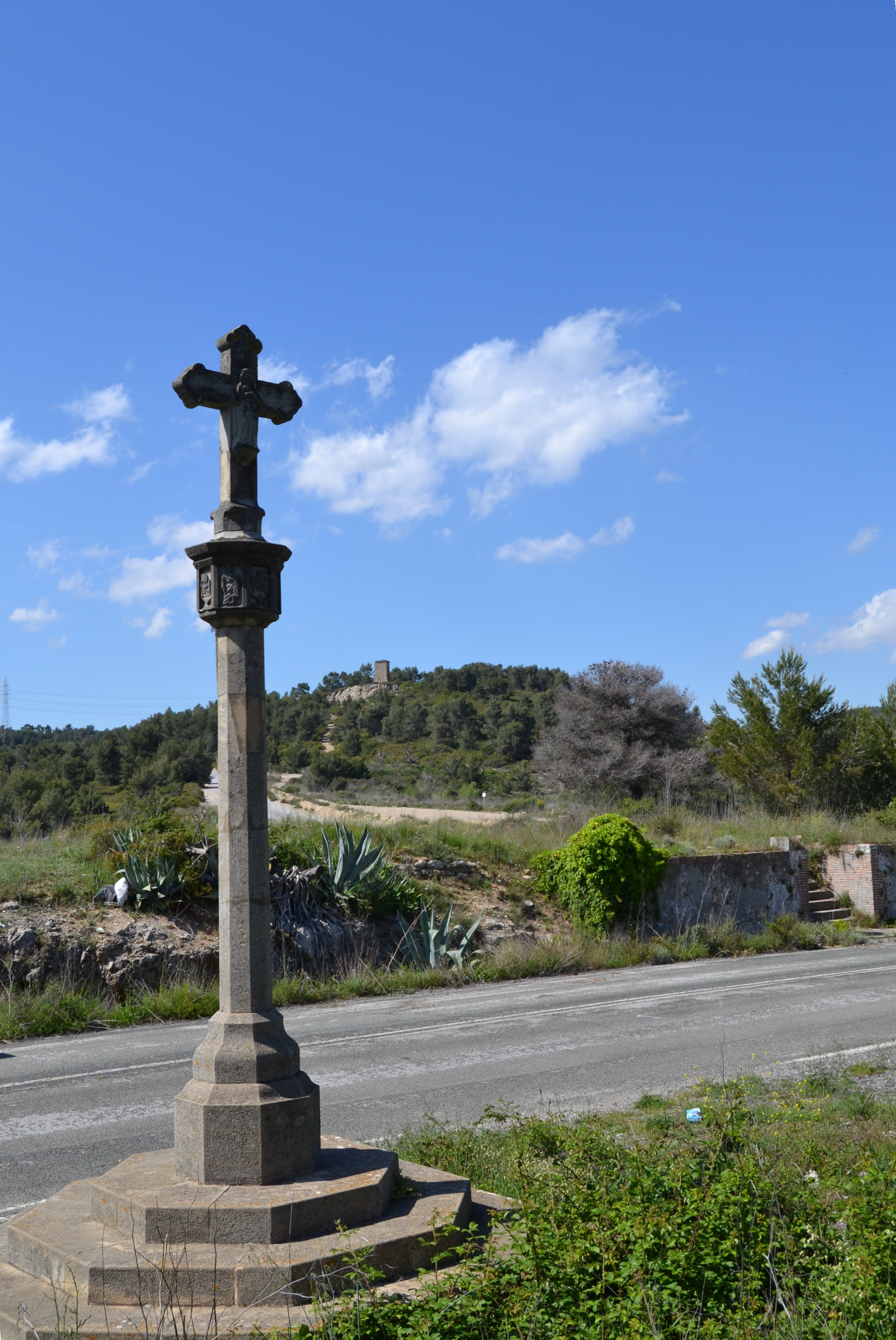 Creu del Port d'Ordal (Cervelló)